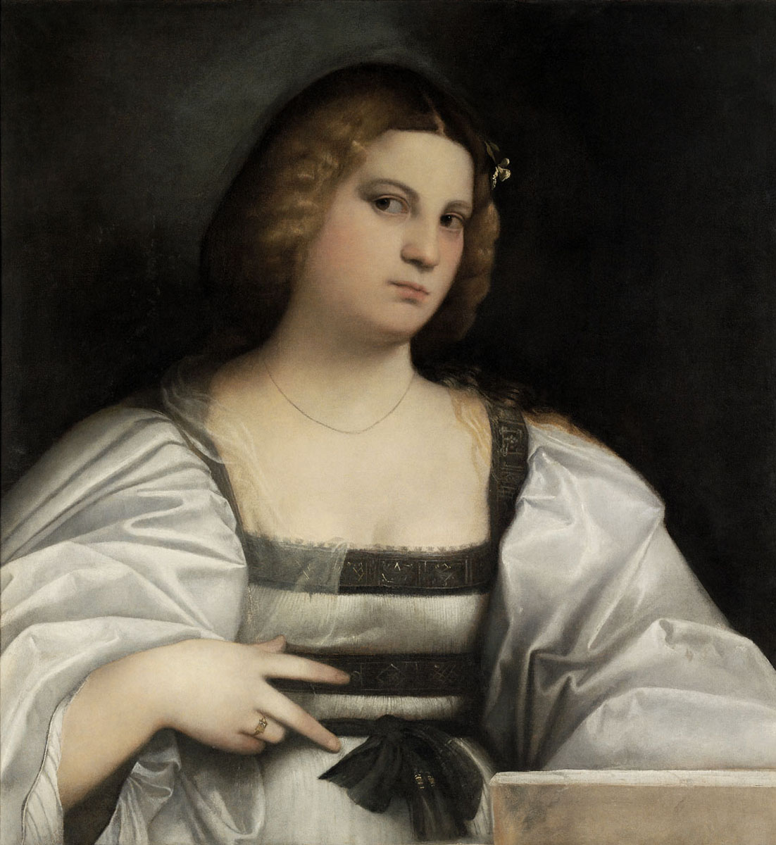 Giovanni Cariani, 1510s(?): Lady Behind a Parapet, Budapest, Szepmuveszeti Museum